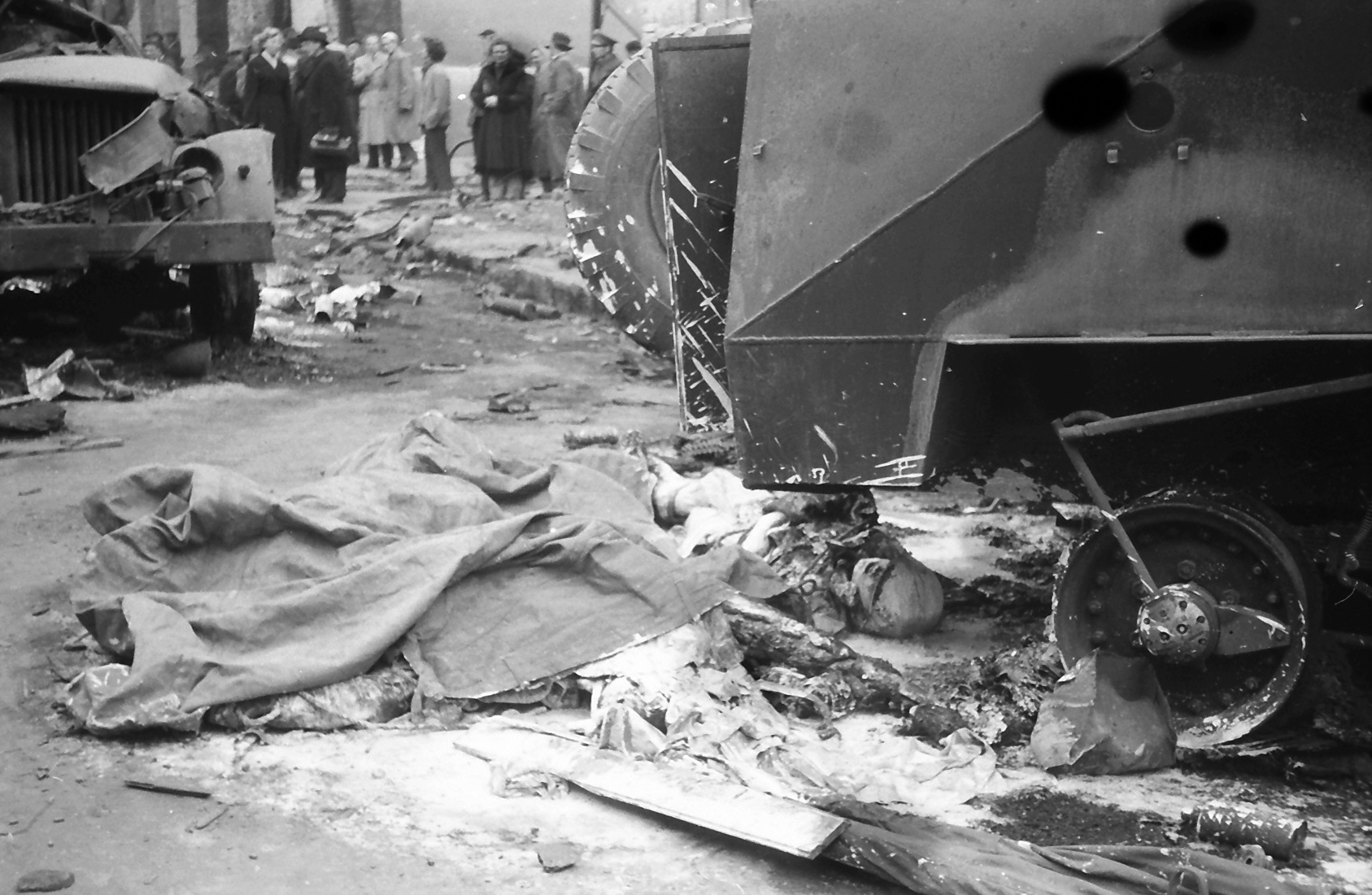 Práter utca, kilőtt teherautó és BTR-152 páncélautó. Location: Hungary, Budapest VIII. Tags: wreck, commercial vehicle, combat vehicle, corpse, Budapest, revolution Title: Práter utca, kilőtt teherautó és BTR-152 páncélautó.